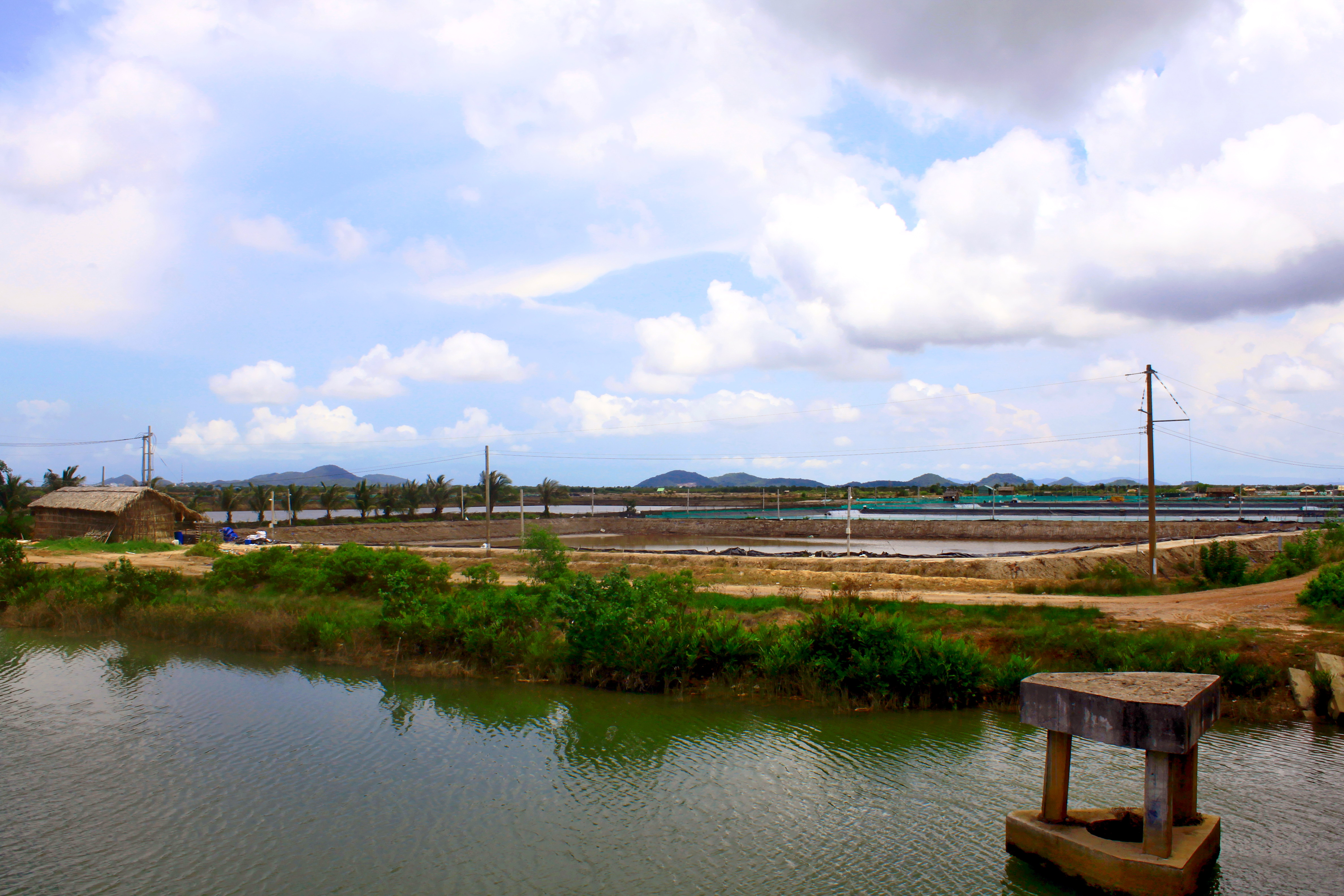 Một trong số những trang trại nuôi thủy sản trên bờ kênh Hà Giang, thuộc xã Phú Mỹ, huyện Giang Thành, Kiên Giang, Việt Nam.